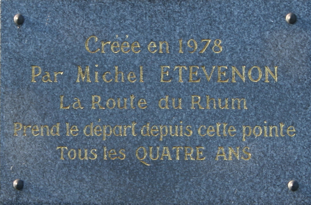 Plaque commémorative de la Route du rhum à la pointe du Grouin.